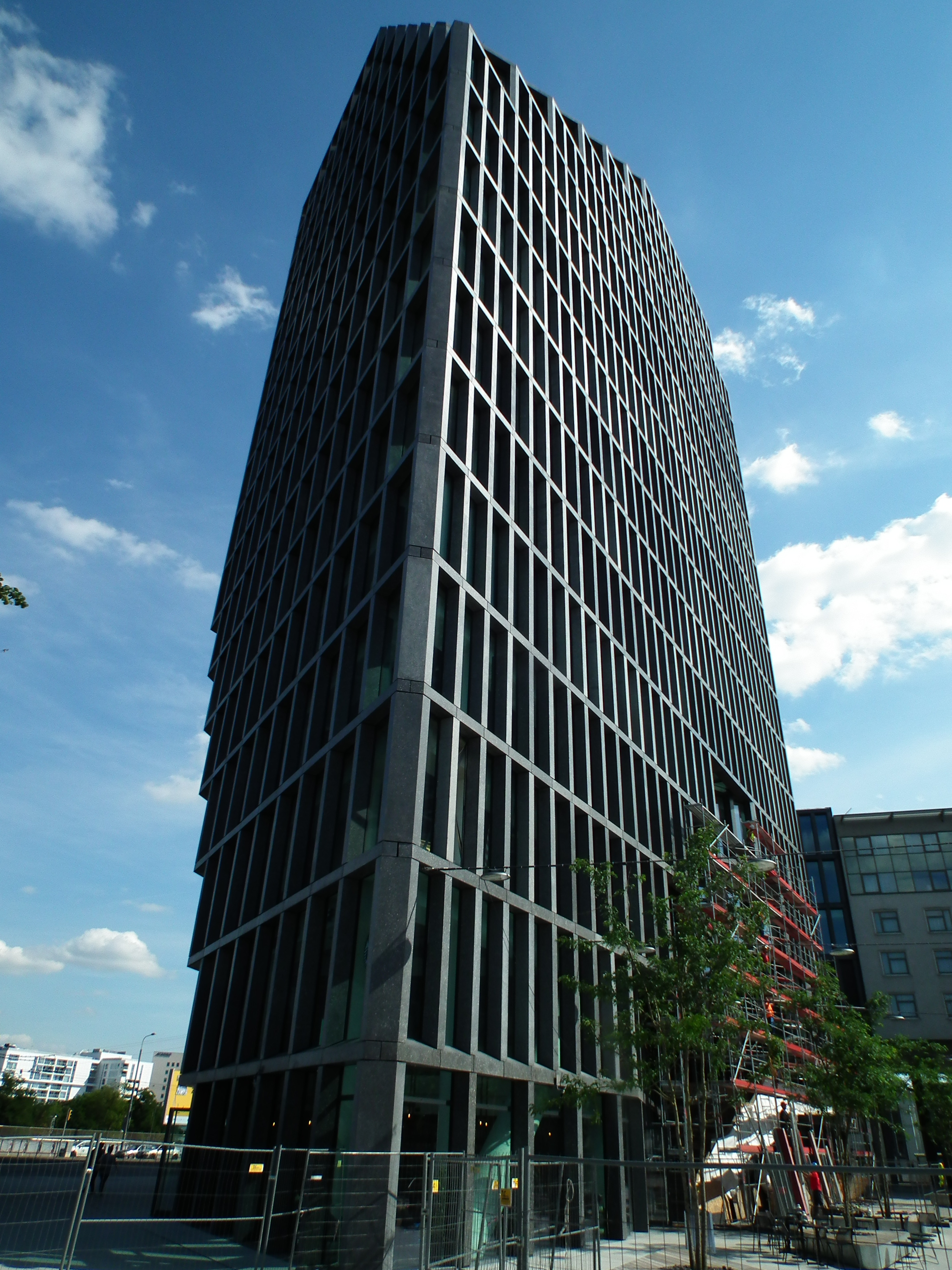 22 Roosevelta Street in Poznań. Nowy Bałtyk.